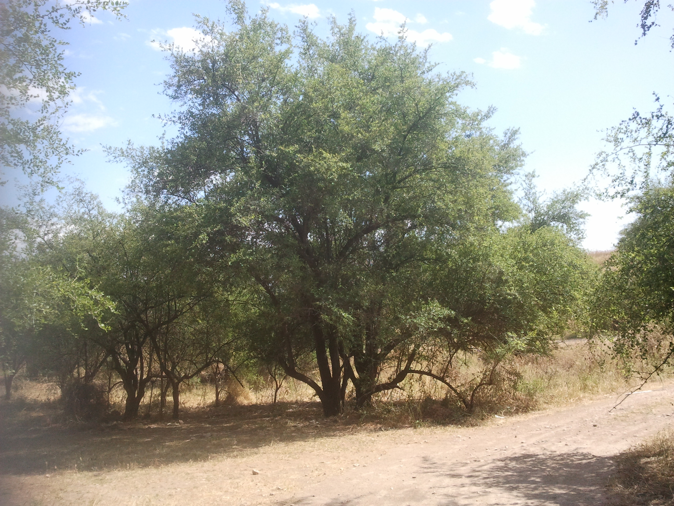 עצי שיזף מצוי בחורשה ליד עין חוקוק בגליל